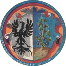 Wappen der Stadt Weinsberg, frühes 17. Jahrhundert. Aus: Jacob Ramminger: Seehbuch, darinnen alle Seeh und Weyher in dem löplichen Hertzogthumb Würtemberg. Württembergische Landesbibliothek, Cod.hist.fol.261